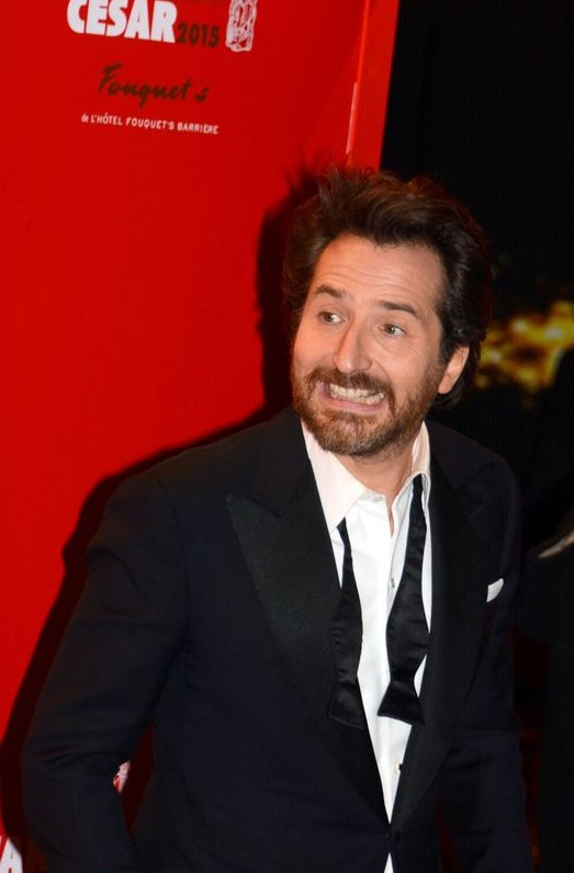 Edouard Baer à la cérémonie des César